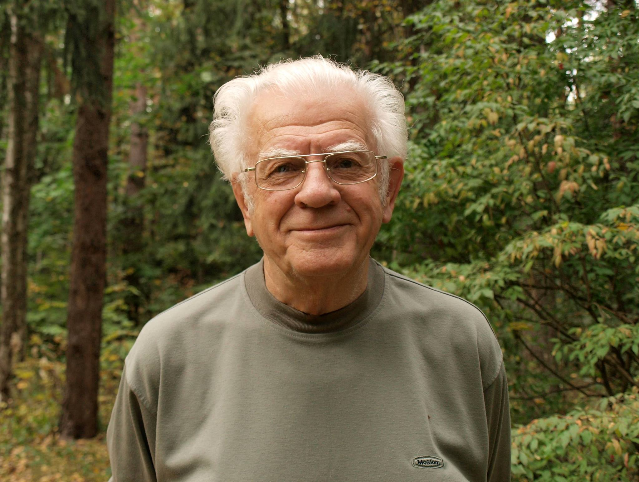 Визгин, Владимир Павлович, историк науки